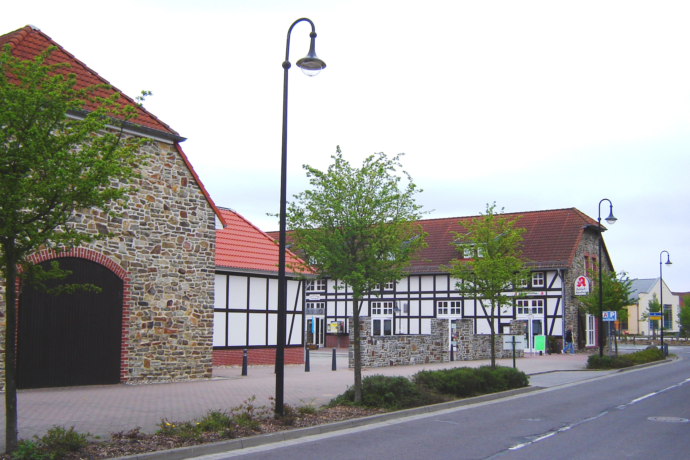 Zentrum von Flechtingen in Sachsen-Anhalt, Deutschland